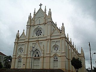 Paroquia Sao Luis Gonzaga de Casca